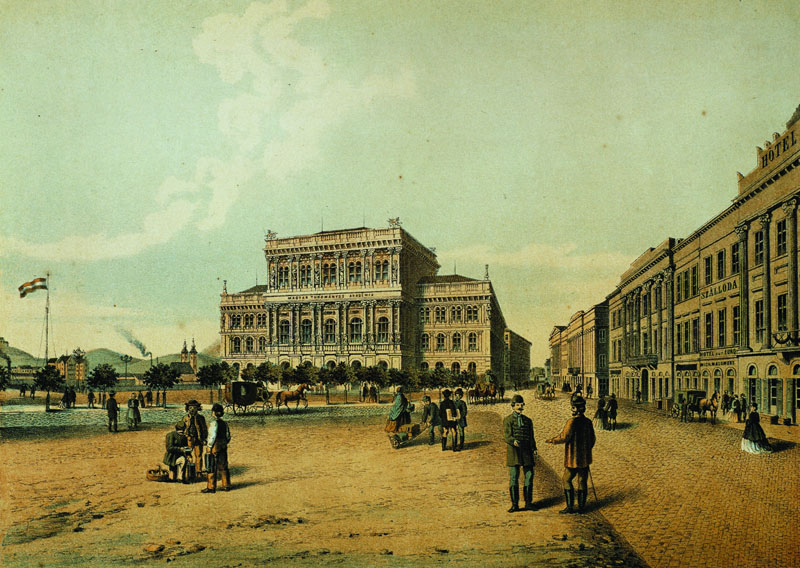 Az MTA palotája. Adam Slowikowski színes litográfiája (Magyar Nemzeti Múzeum T. 2869)